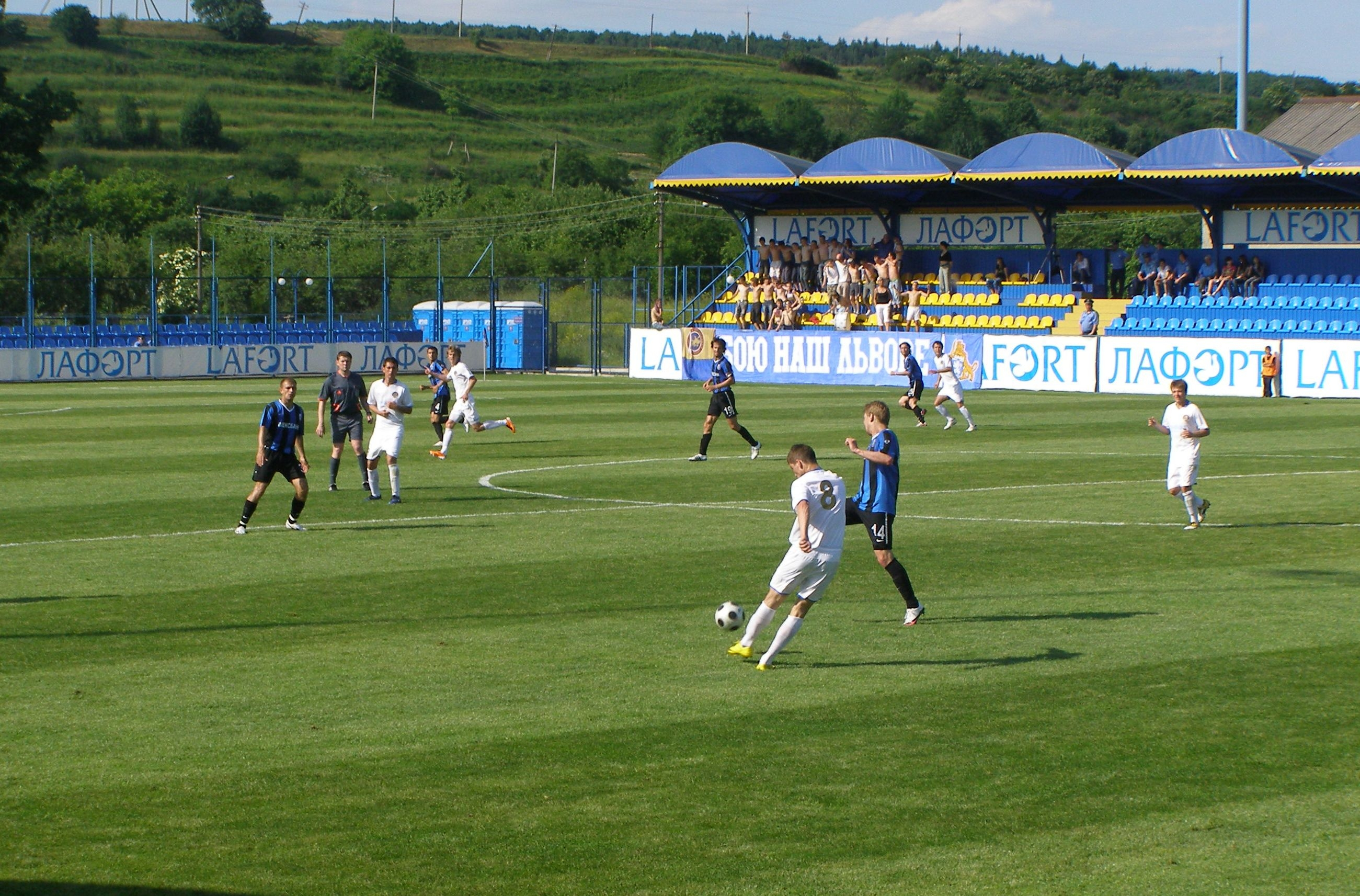 ФК "Львів" - "Чорноморець" Одеса (2011)